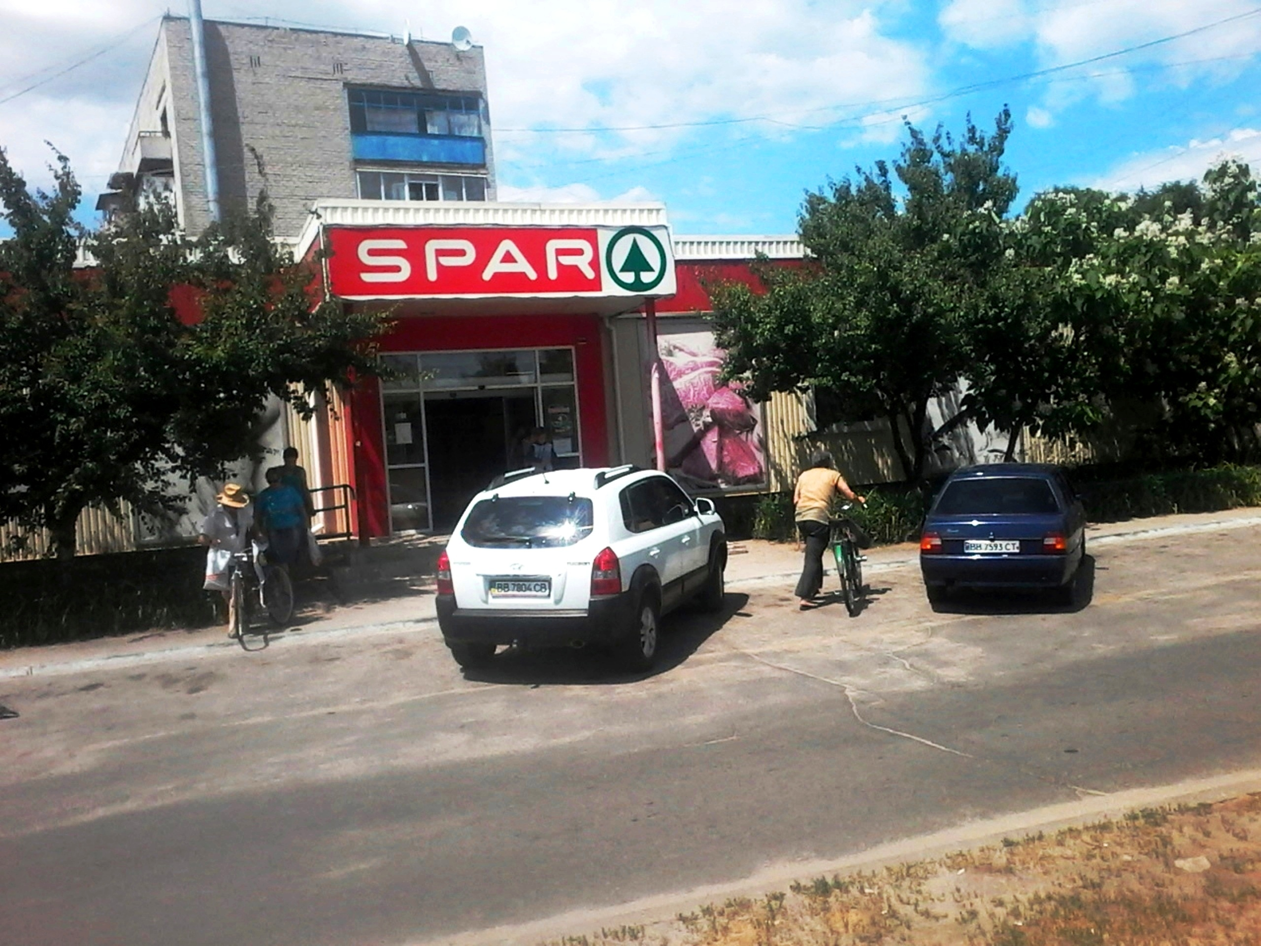 Магазин Спар в городе Счастье, бывший Детский мир